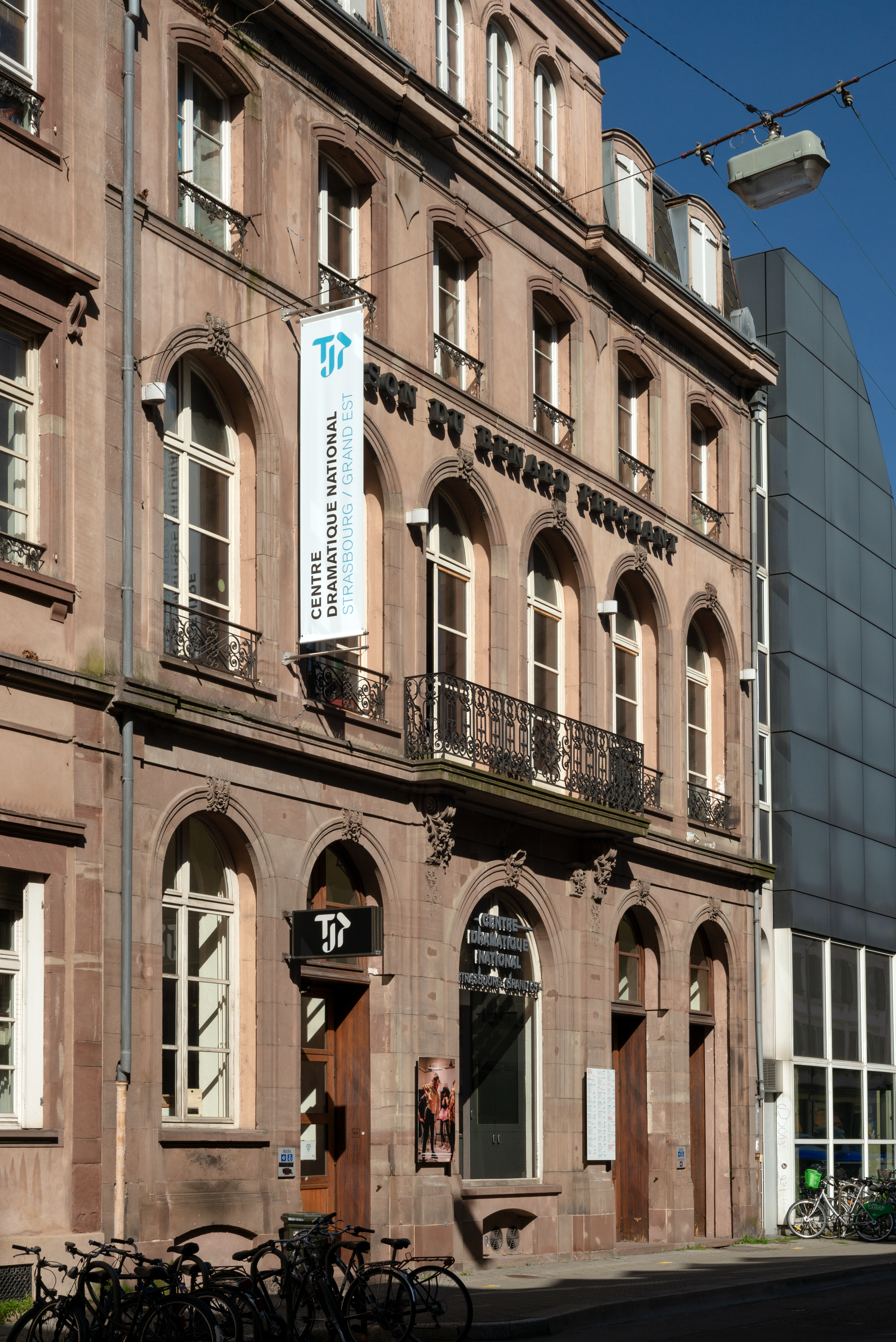 TJP - La façade de la Grande Scène, 7 rue des balayeurs, Strasbourg